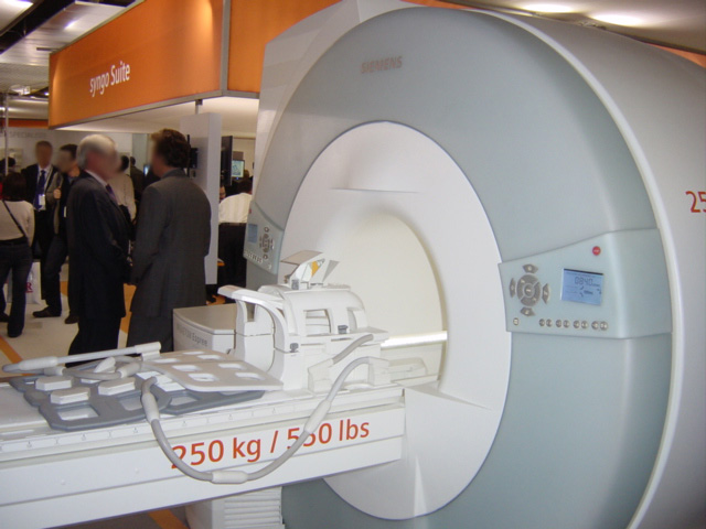 IRM Siemens avec ses antennes : Une volumique (antenne de tête) et trois surfaciques.